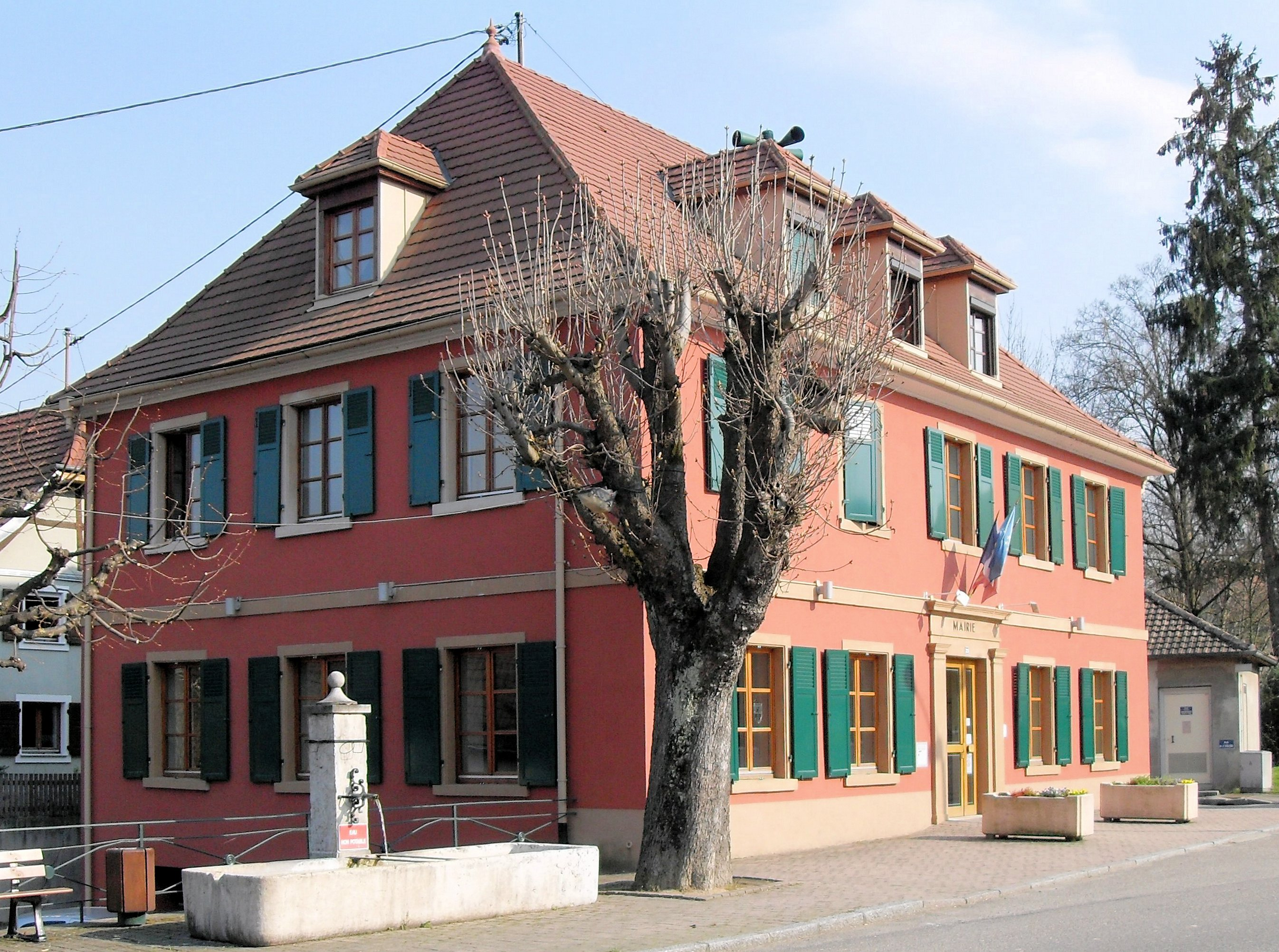 La mairie d'Uffheim